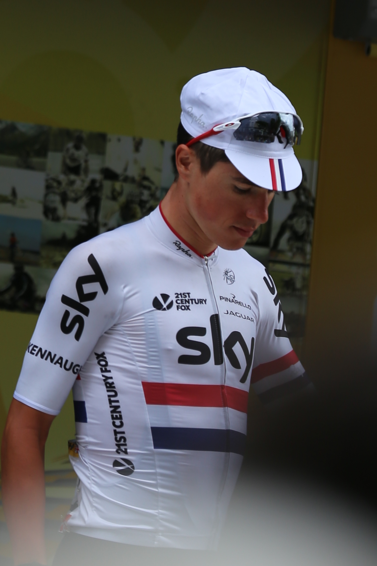 Peter Kennaugh lors du départ de la 8e étape du Tour de France 2015 à Rennes.